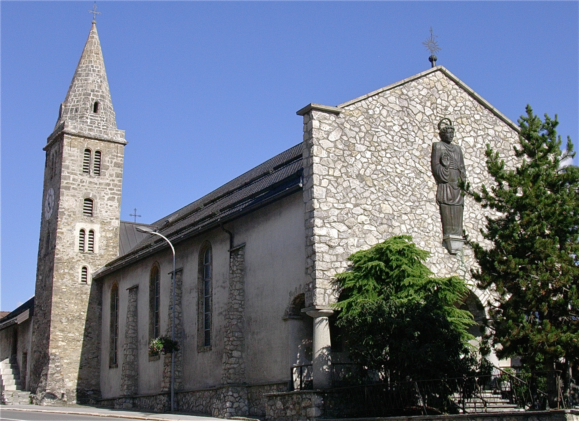 L'église saint-Pancrace à Grimisuat